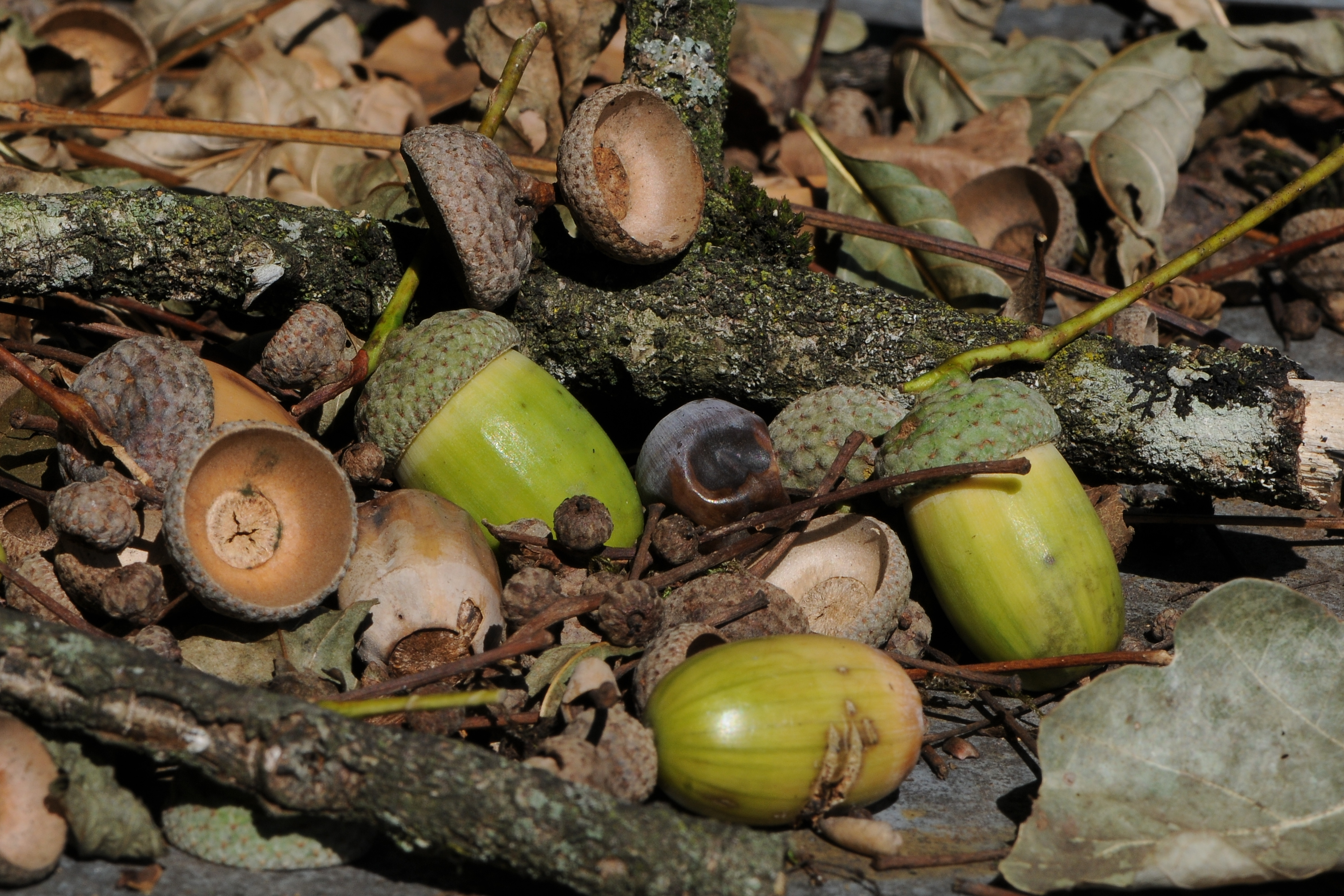 Eichel der Stieleiche.